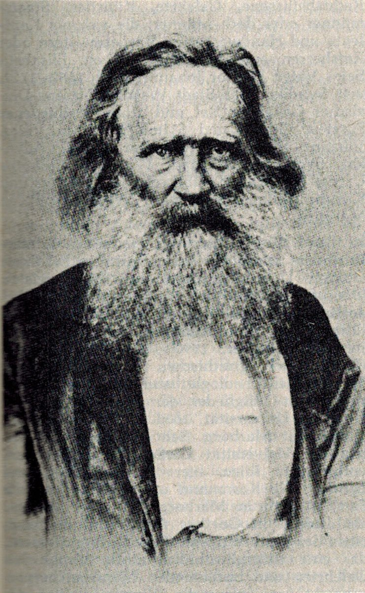 Ferdinand Lindheimer, 1801-79, deutschamerikanischer Botaniker